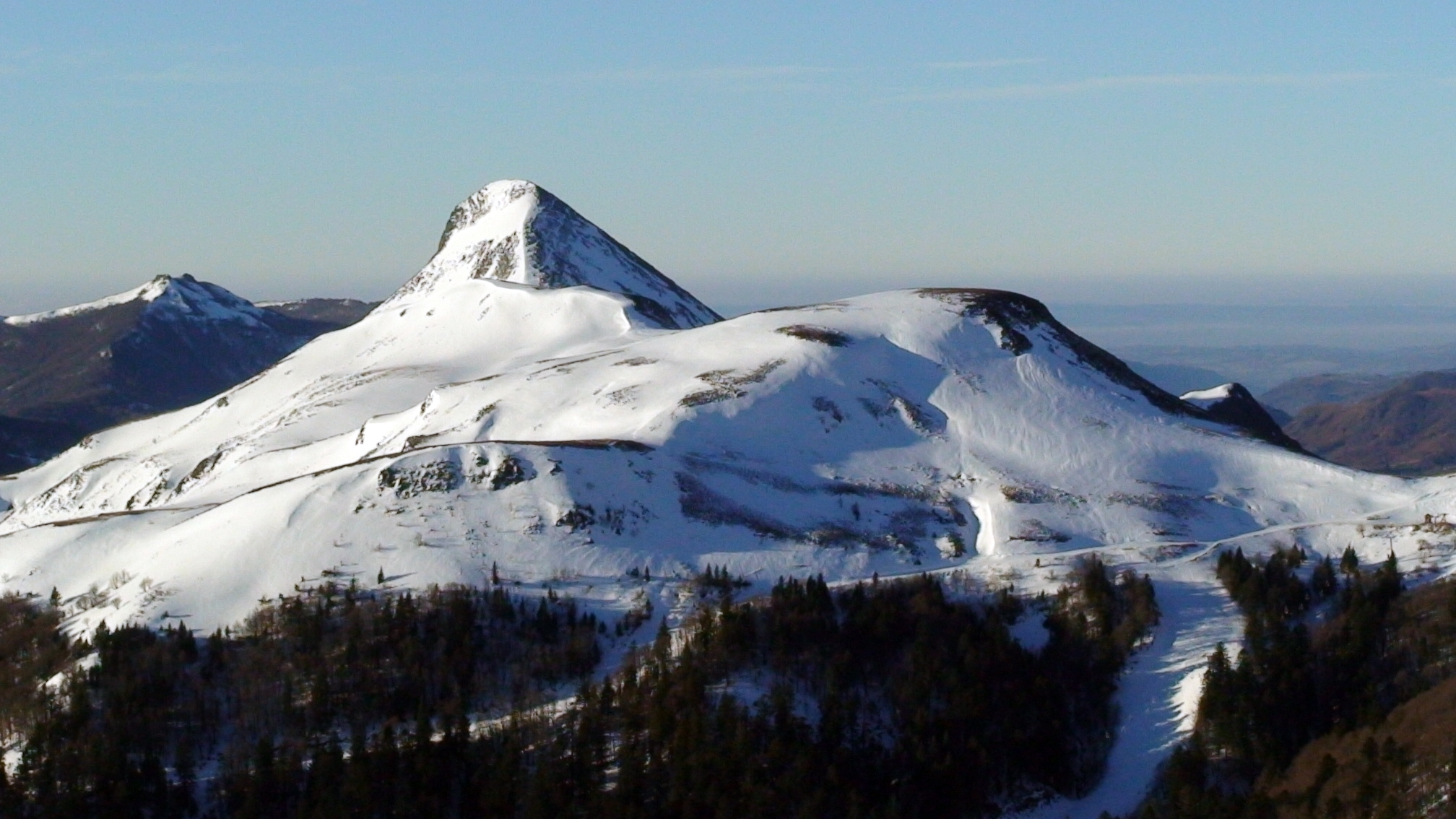 Puy Griou vu depuis le Roc du Bec de l'Aigle